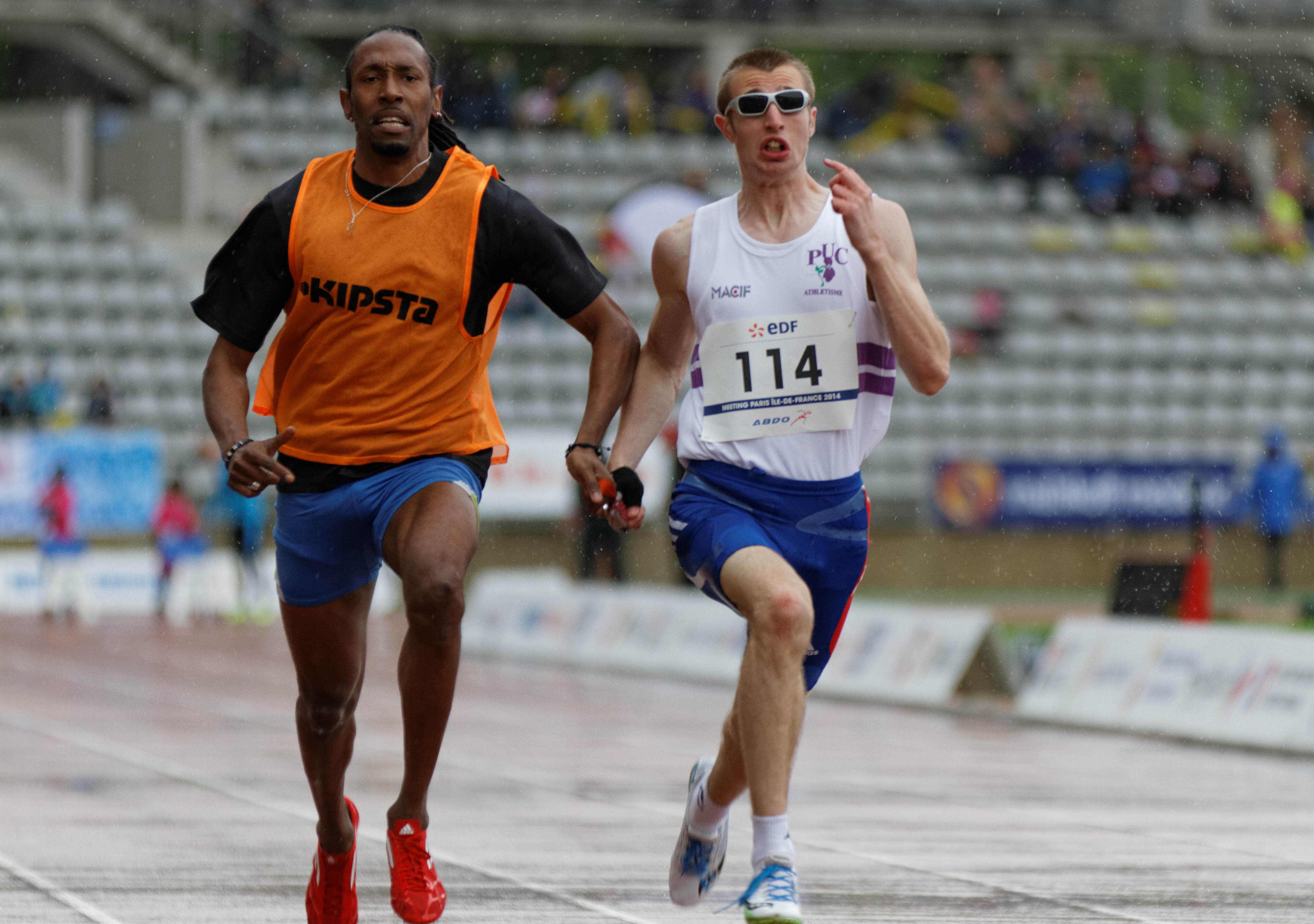 Timothée Adolphe et Cédric Felip (guide), 100m, Meeting d'Athlétisme Paralympique de Paris, 4 juin 2014.